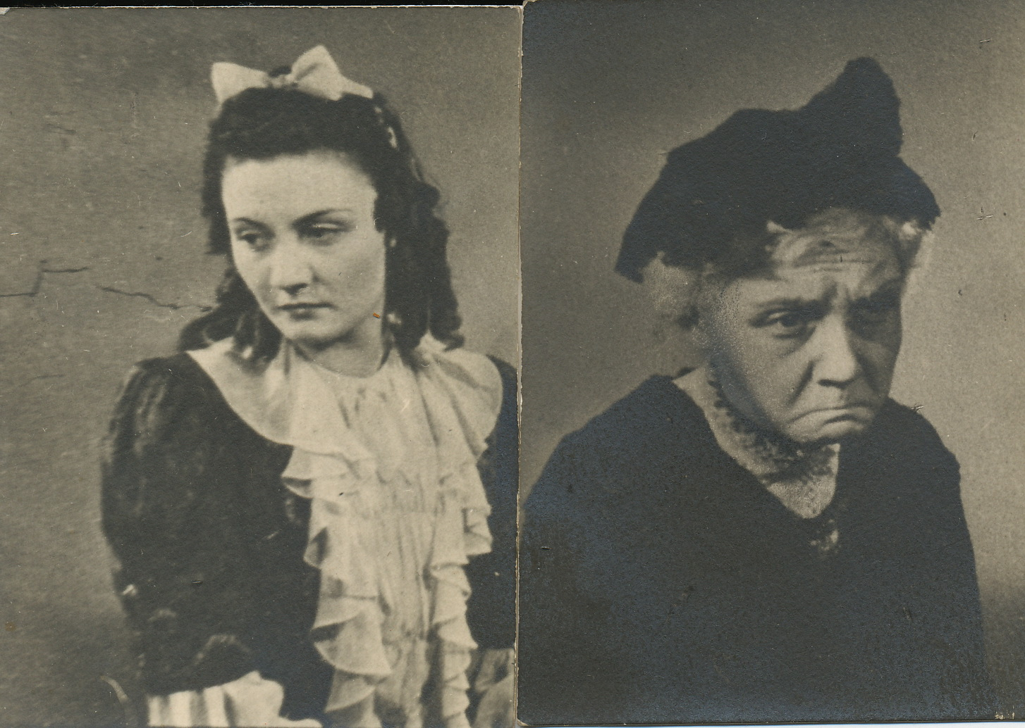 Hotti Éva 21 évesen játszotta az "A bolond Ásvaynét" (1941.06.09. Nagyvárad)